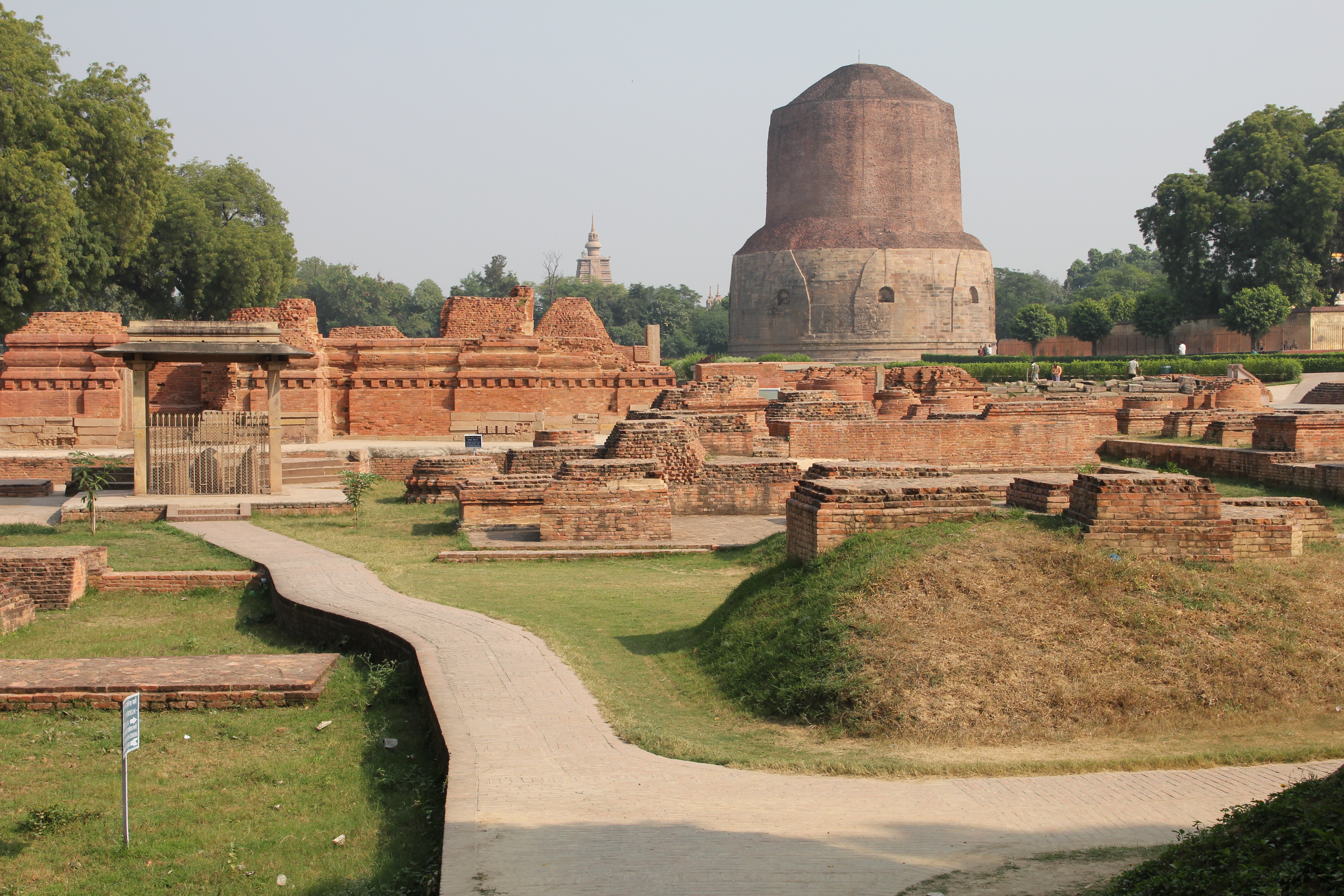 Saranath